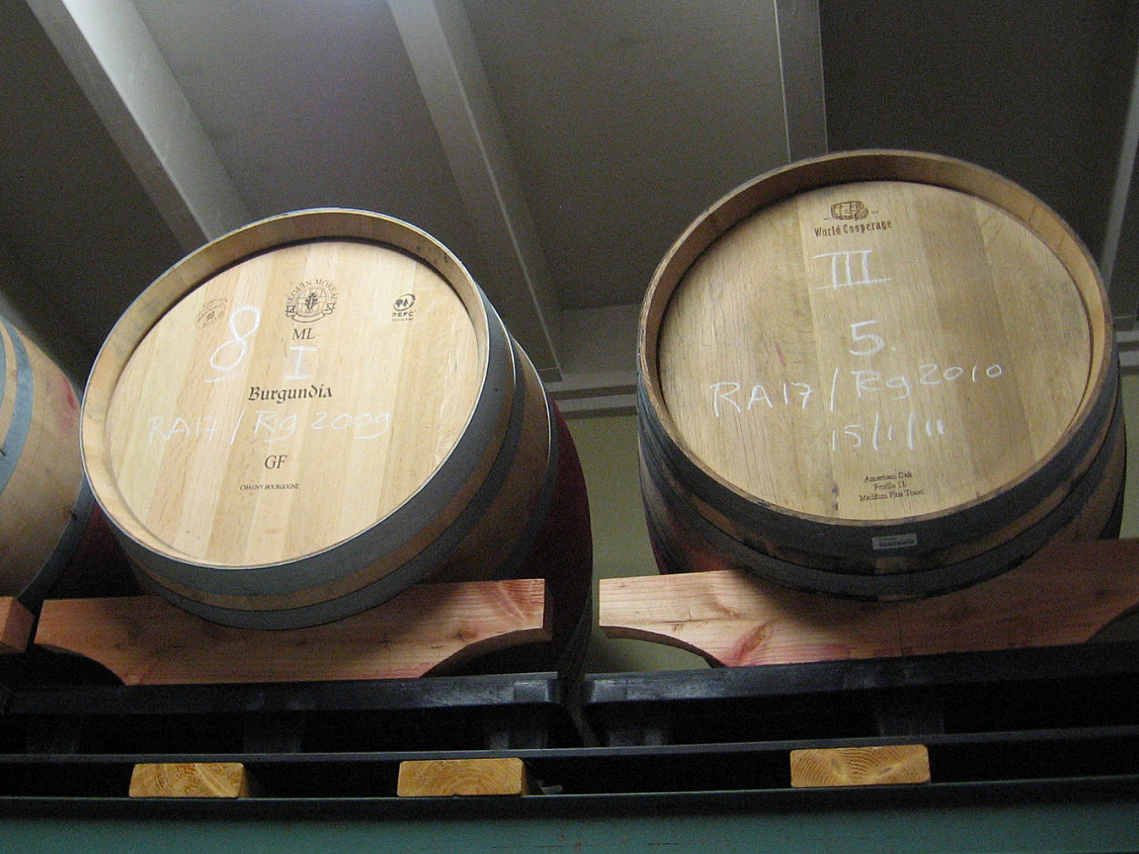 Tonneaux de la cave de Breede Beek